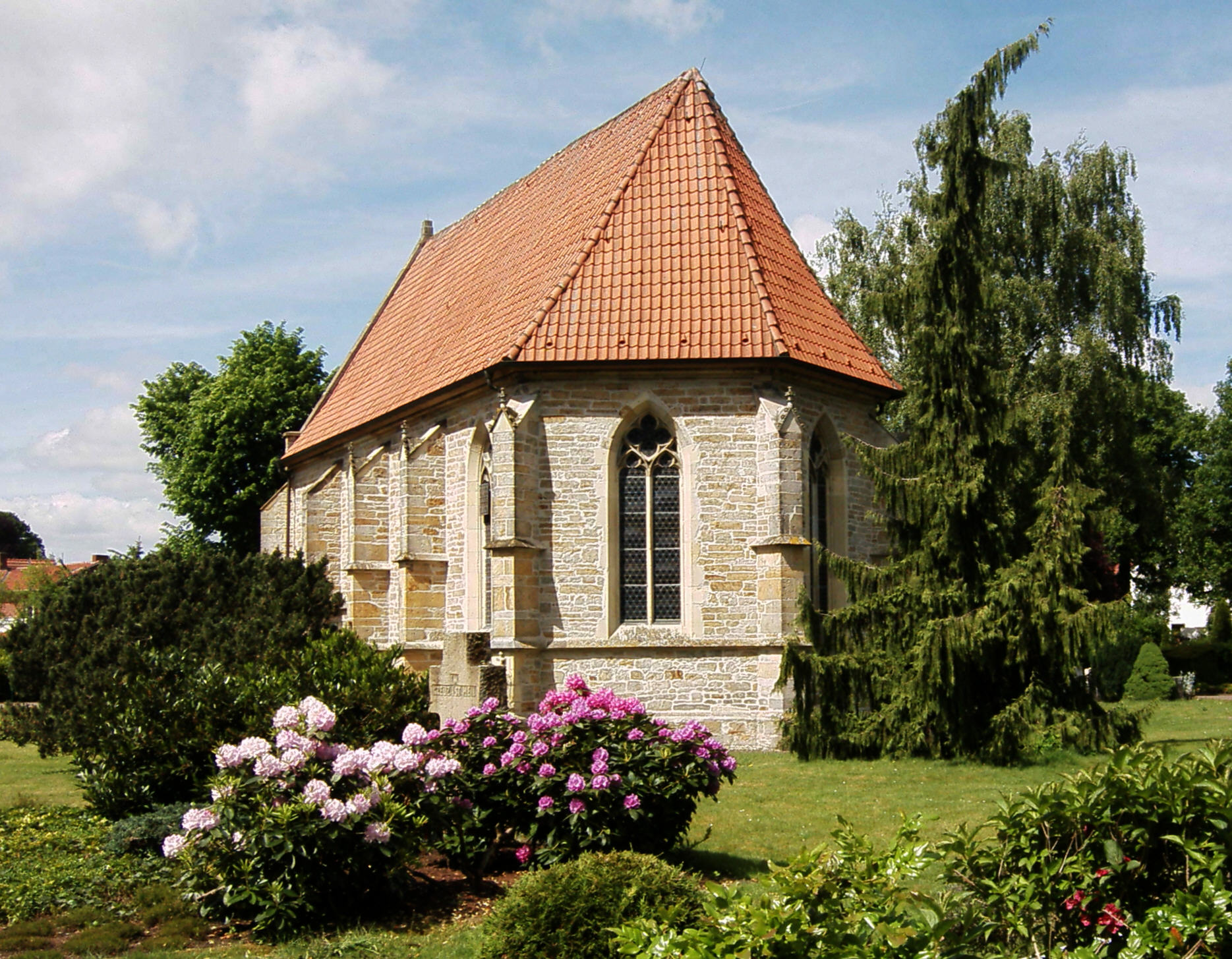 Mesum „alte Kirche“, ältestes Bauwerk in Rheine (erbaut um 1350) Mesum, Rheine, Kirche auf dem alten Friedhof, soll mit den Steinen der zerstörten Schwanenburg erbaut sein.